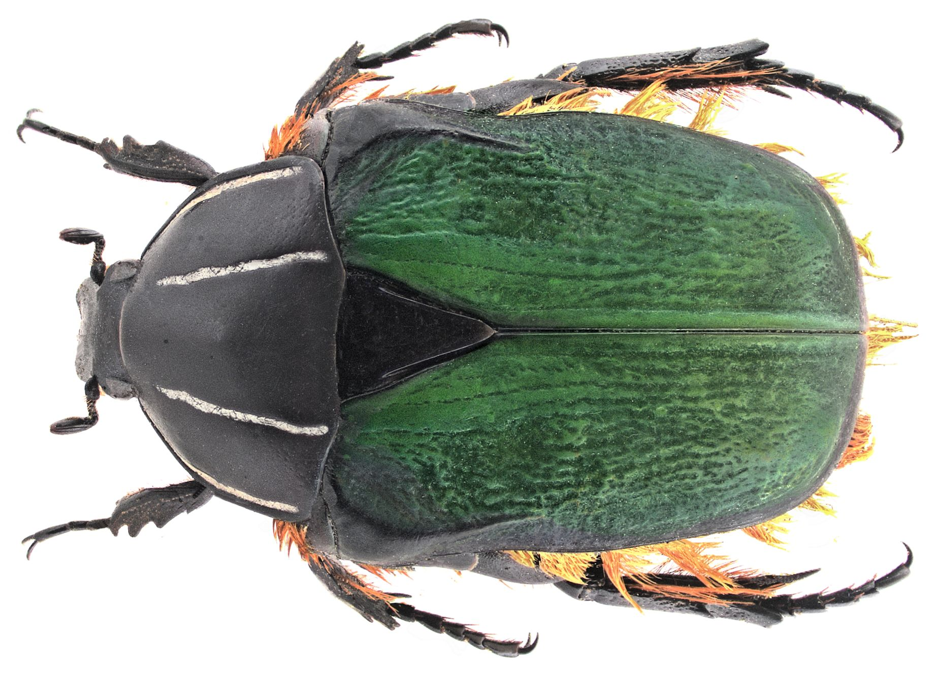 Familie: Scarabaeidae Groesse: 23 mm Verbreitung: Südafrika Fundort: mit Blumen aus Südafrika lebend nach Deutschland importiert leg. N.Bichsel, 2010; det. U.Schmidt, 2011 Photo: U.Schmidt, 2011